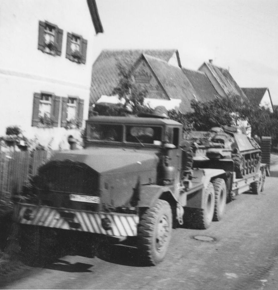 Bergung eines HS30 auf einer Faun-Haubenzugmaschine